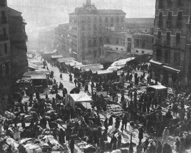 La vida abigarrada y bulliciosa del Rastro, a cuyos puestos van a parar, melancólicamente, tantas cosas que tuvieron un día una vida brillante...